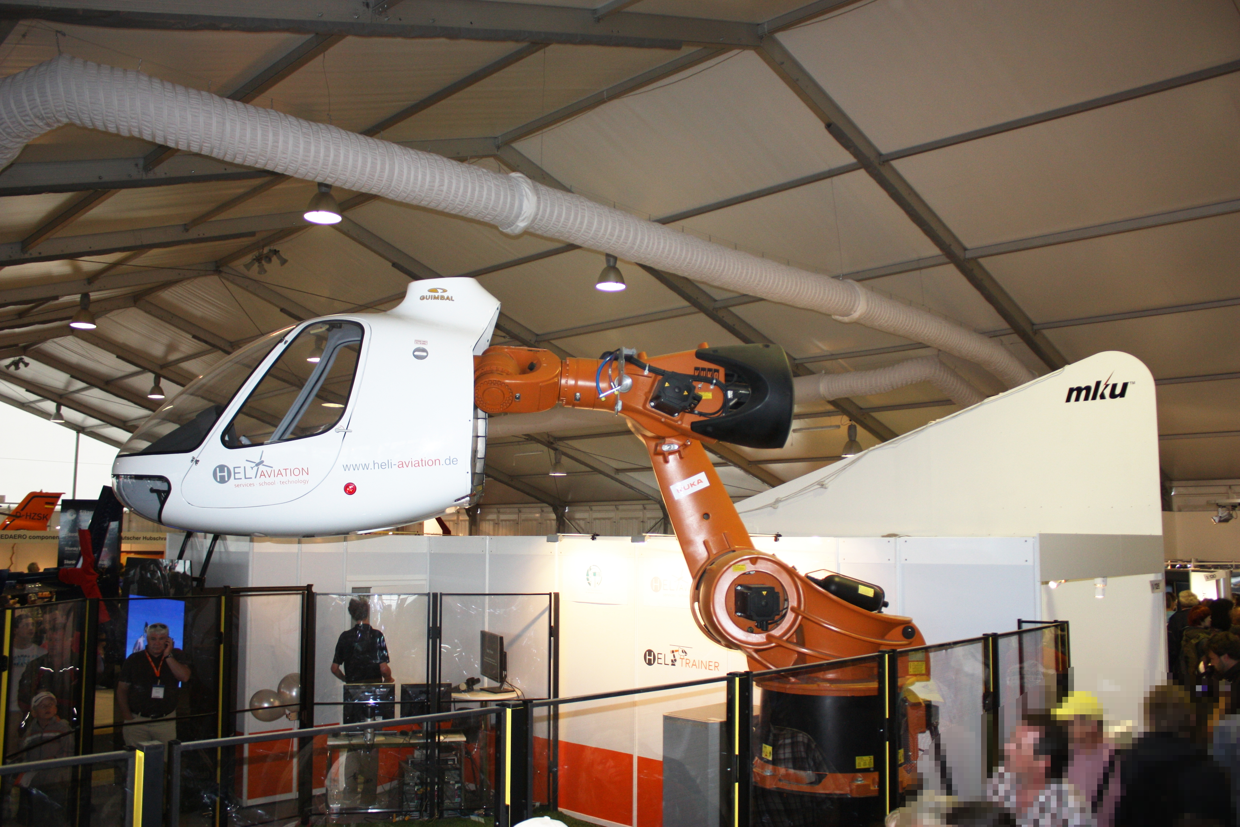 ILA 2010, am Samstag aufgenommen, Heli-Trainer; Max-Planck-Institut für biologische Kybernetik; KUKA-Roboter Typ KR500 TÜV; 6-achsiger Schwerlastroboter; Traglast bis 500 kg; Hubschrauberzelle Typ Guimabal Cabri G2; für 1-2 Personen; zum Training realistischer Hubschraubermanöver